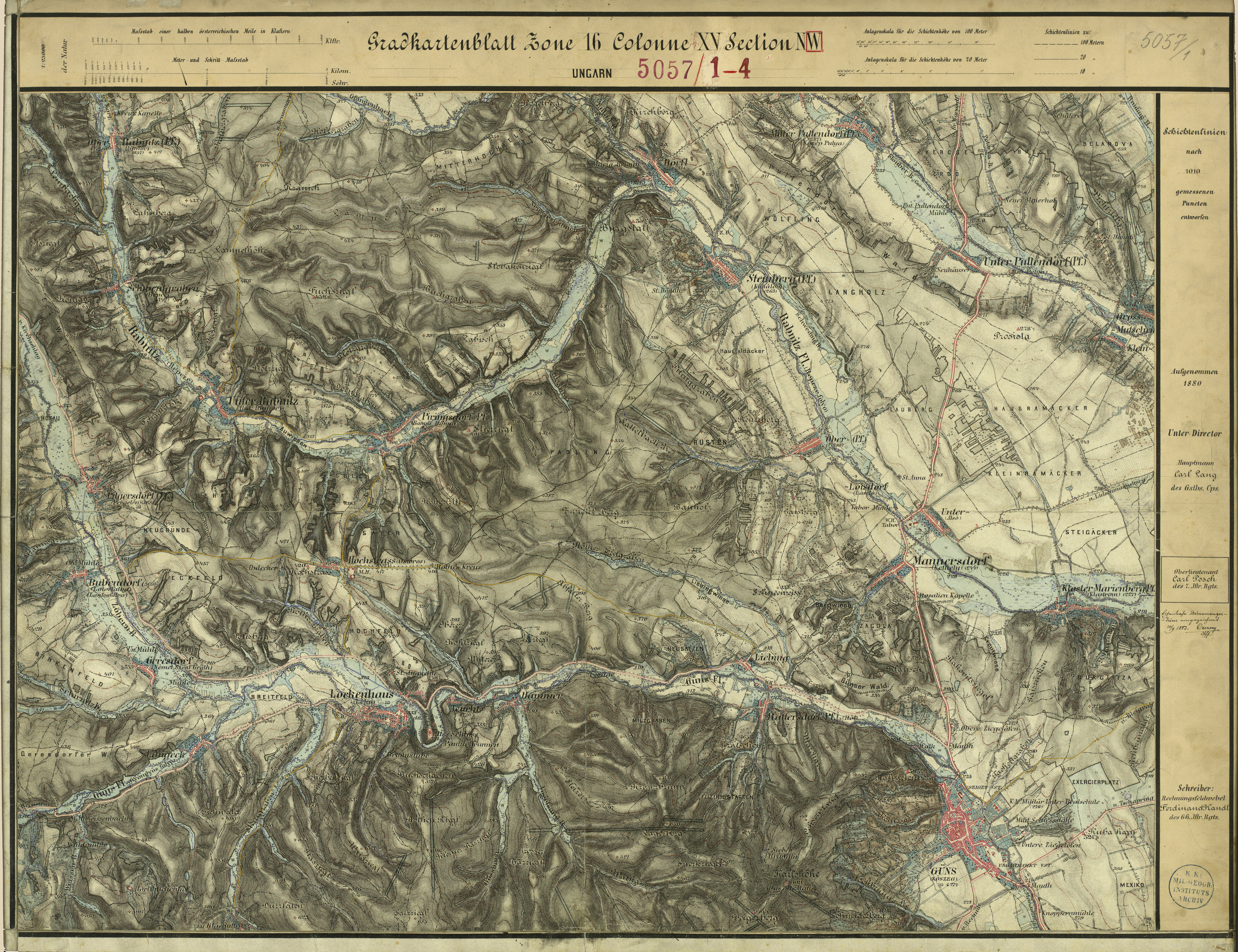 historische Landkarte: Gradkartenblatt Zone 16 Colonne XV Section NW (später 5057/1). Lockenhaus, Unter Rabnitz, Mannersdorf, Oberloisdorf, Kloster Marienberg im Burgenland, Kőszeg / Güns in Westungarn. Franzisco-josephinische (3.) Landesaufnahme der österreichisch-ungarischen Monarchie. Aufnahmeblatt 1:25.000.